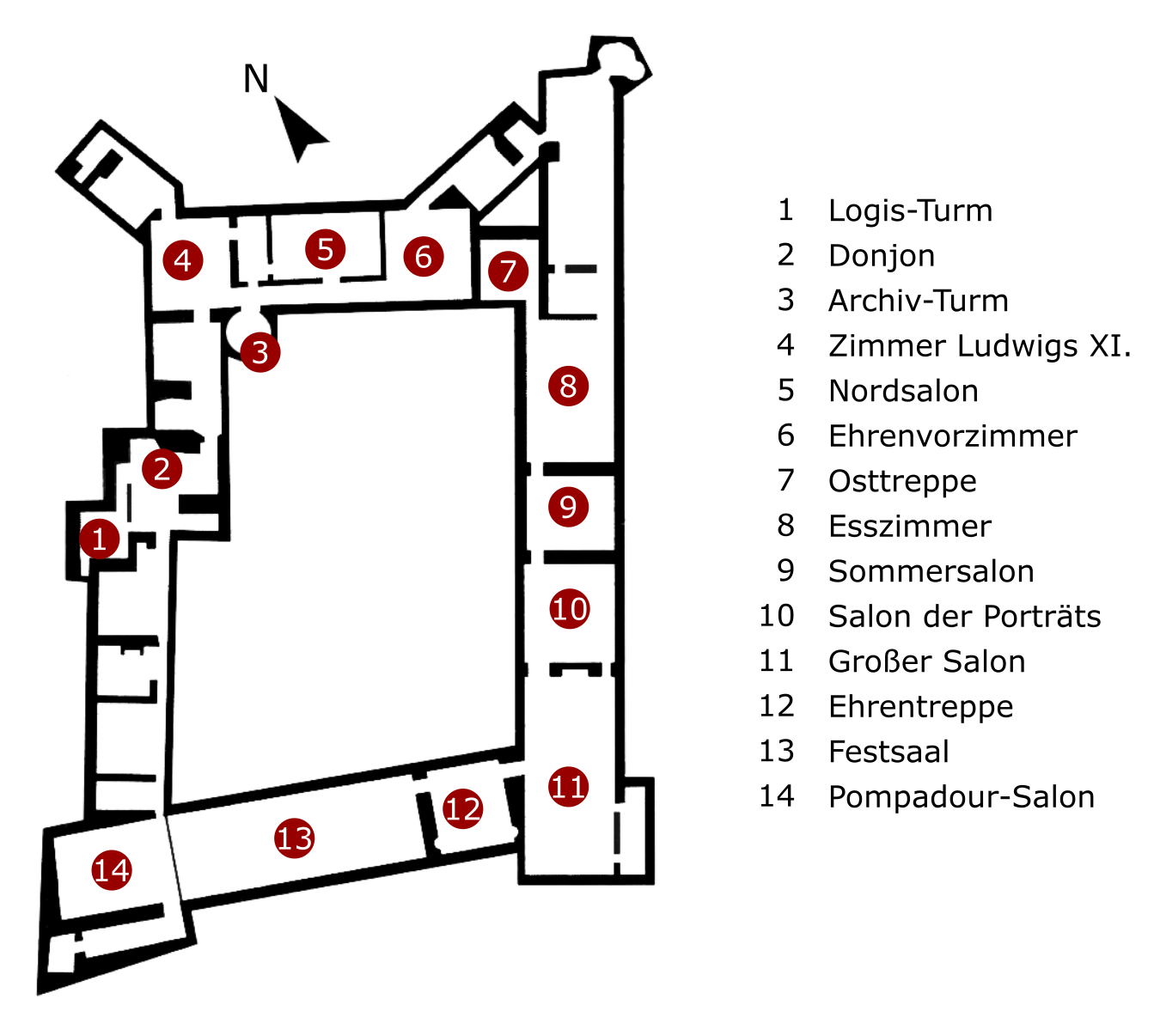 Grundriss des ersten Obergeschosses von Schloss Carrouges, Département Orne, Basse-Normandie